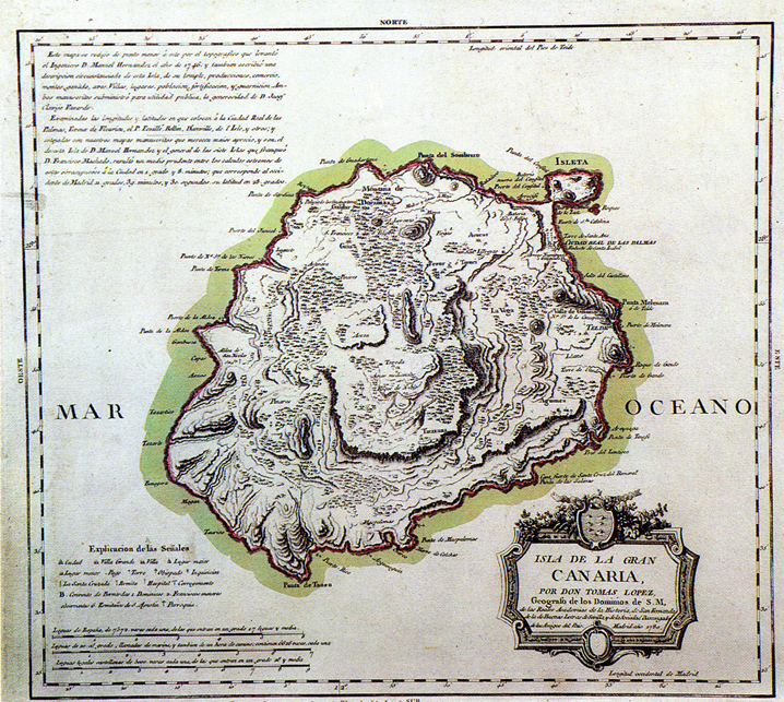 Mapa de Gran Canaria del siglo XVIII